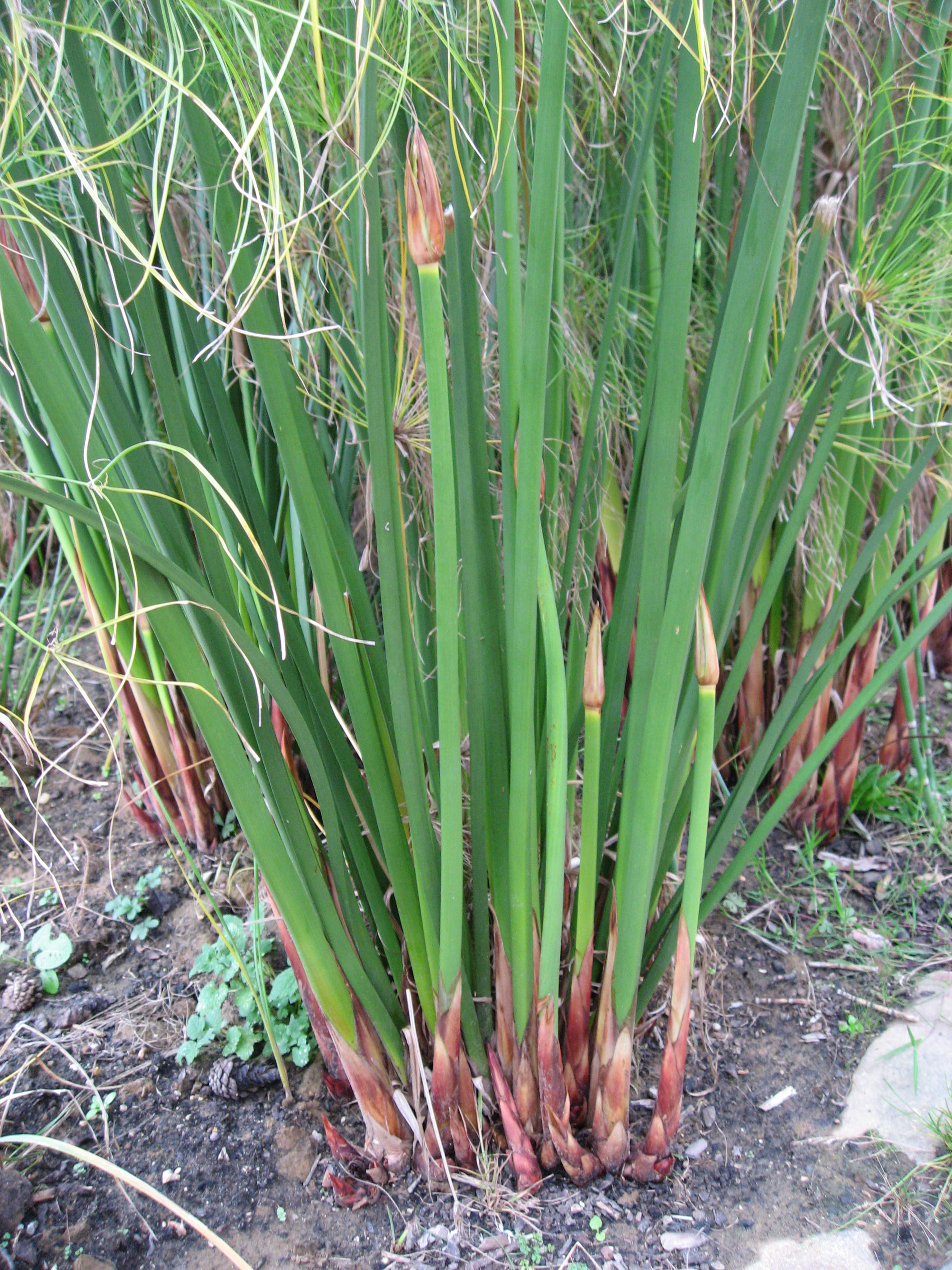 Cyperus papyrus in Parc floral de Paris Map: 48° 50' 19" N 2° 26' 33" E